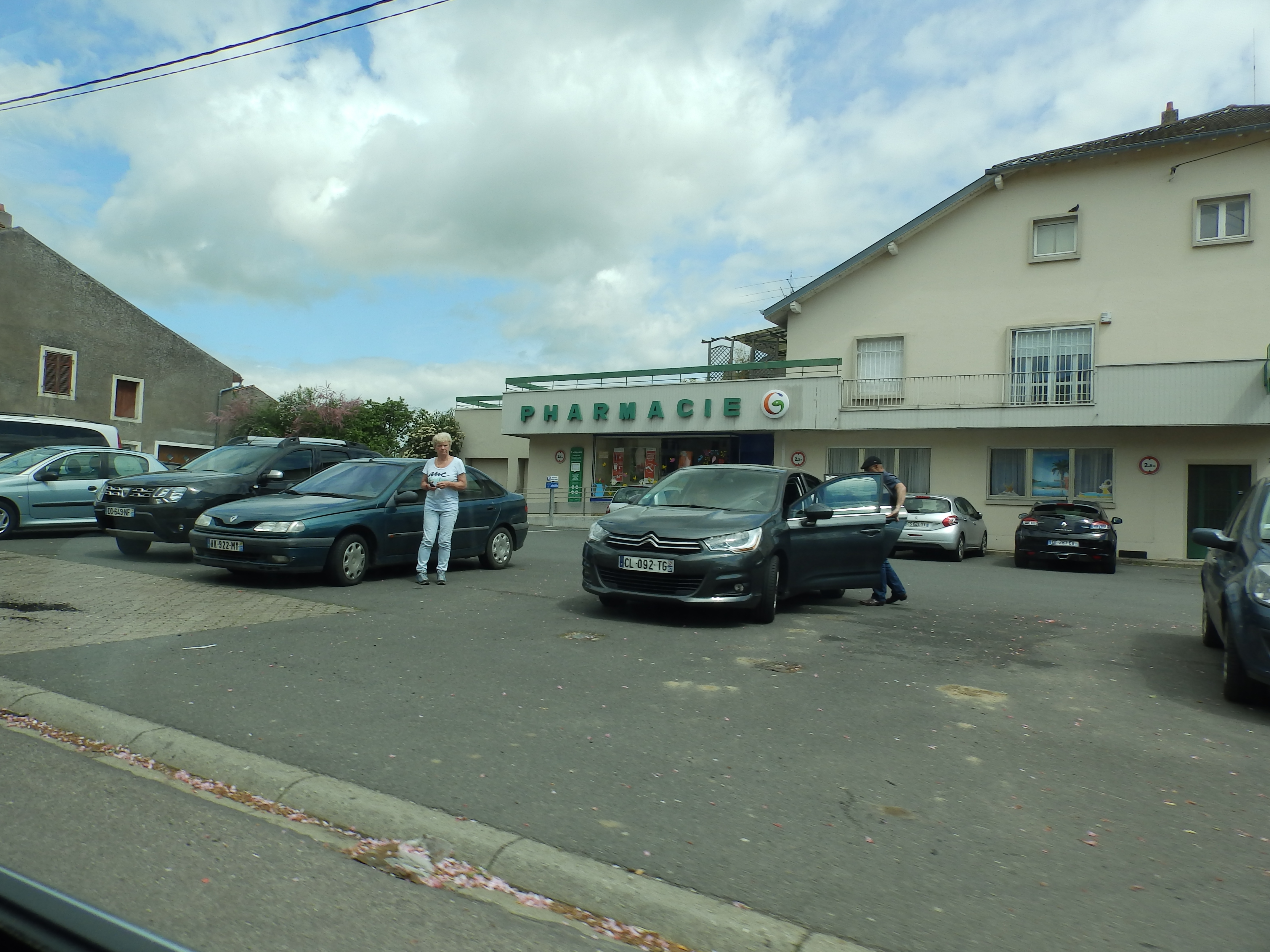 In Frankrijk